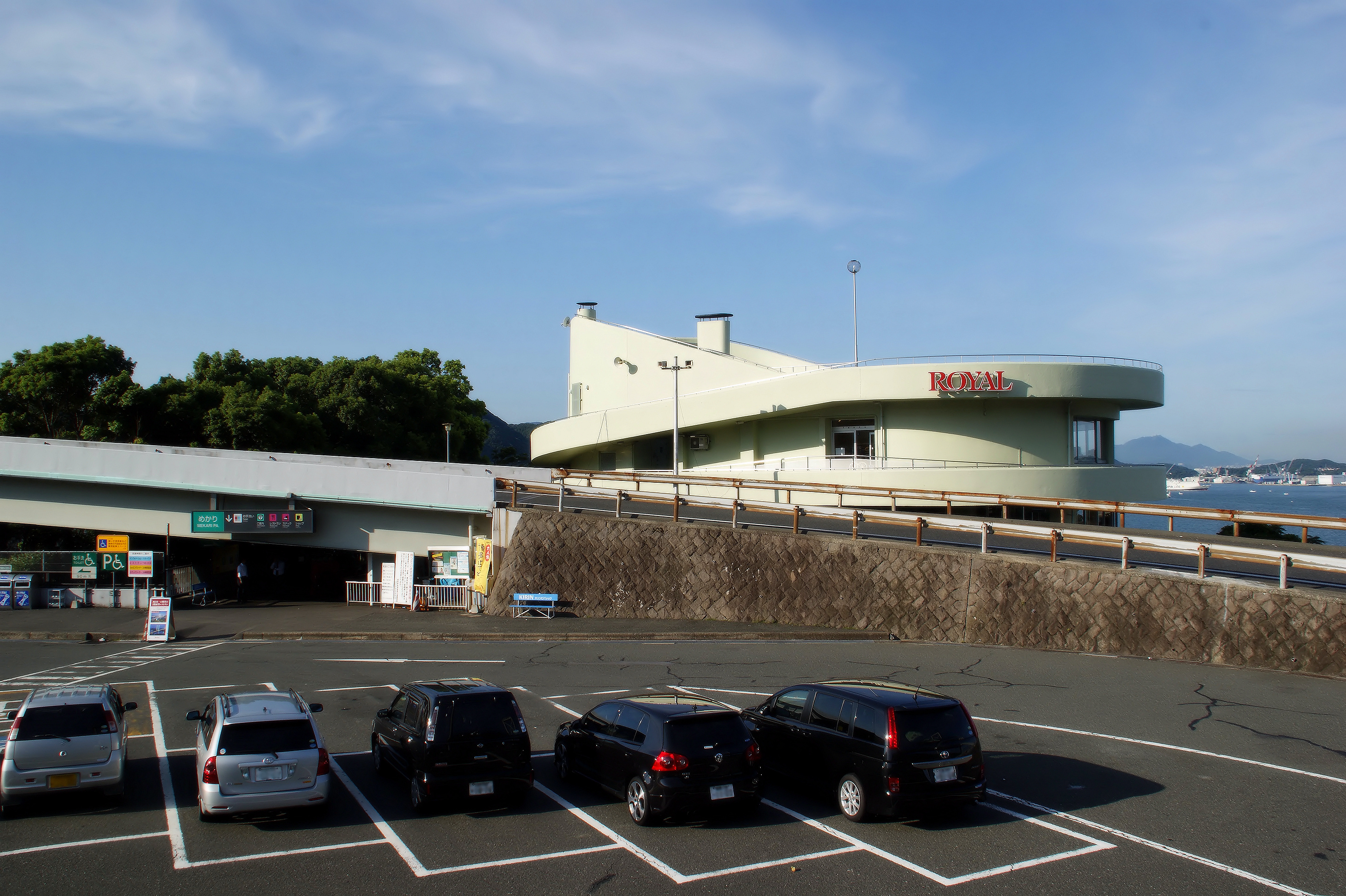 Kanmonkyo Bridge, Mekari Parking Area.(Moji Ward, Kitakyushu City, Fukuoka Prefecture, Japan)